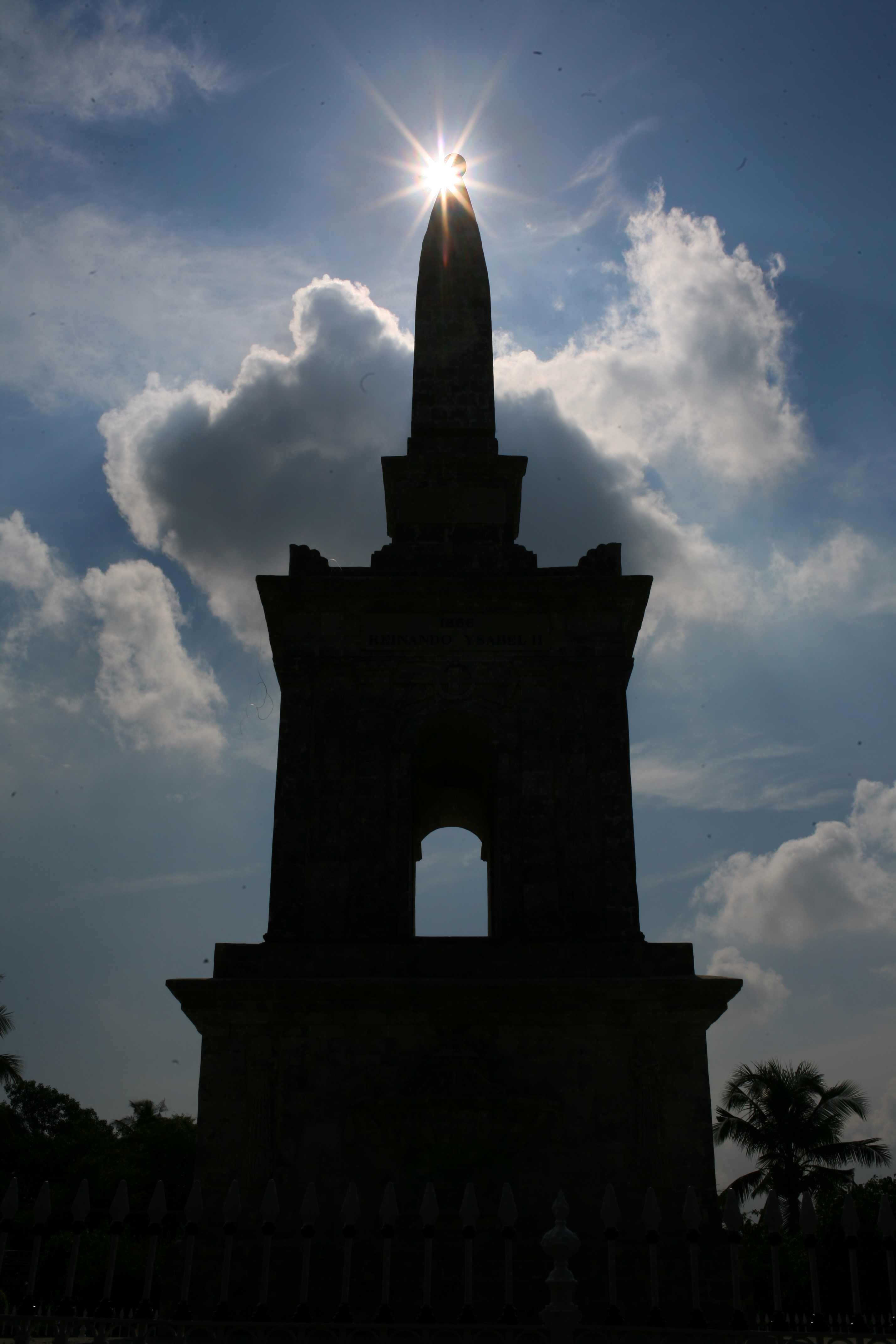 Il monumento eretto in onore di Ferdinando Magellano a Mactan nel 1866